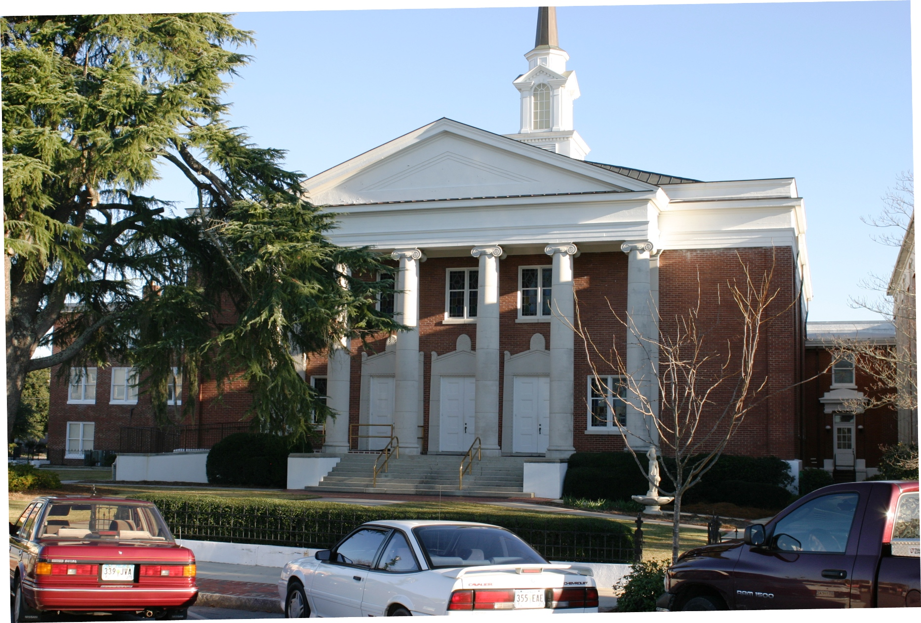 First Baptist Church, Orangeburg, SC